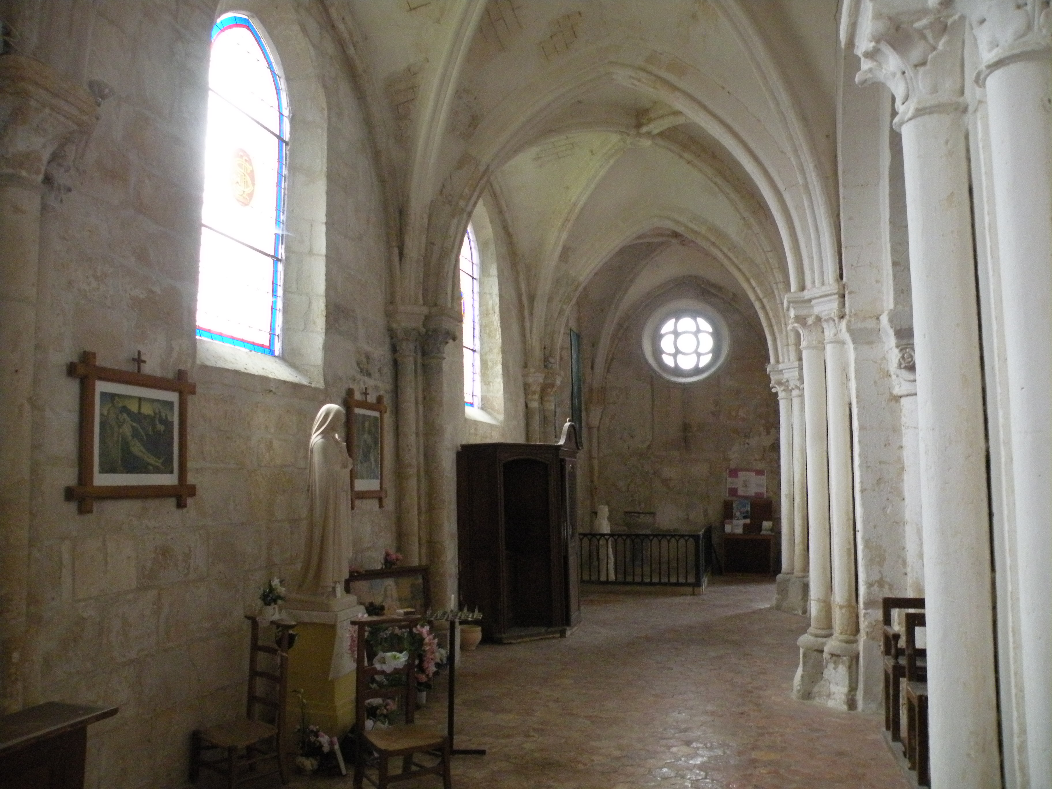 Intérieur de l'église Saint-Pierre-Saint-Paul d'Arronville